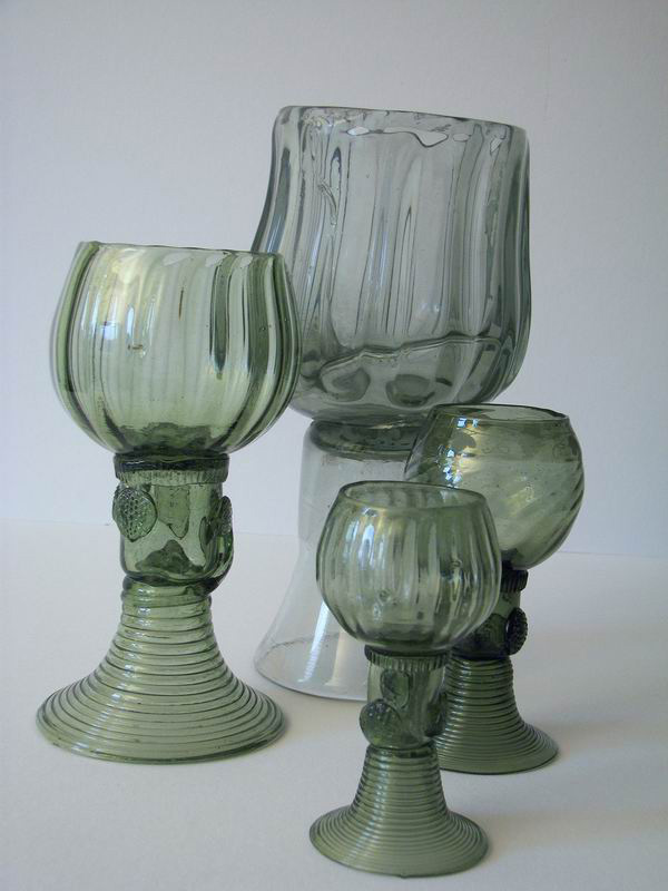 Waldglas Lauscha